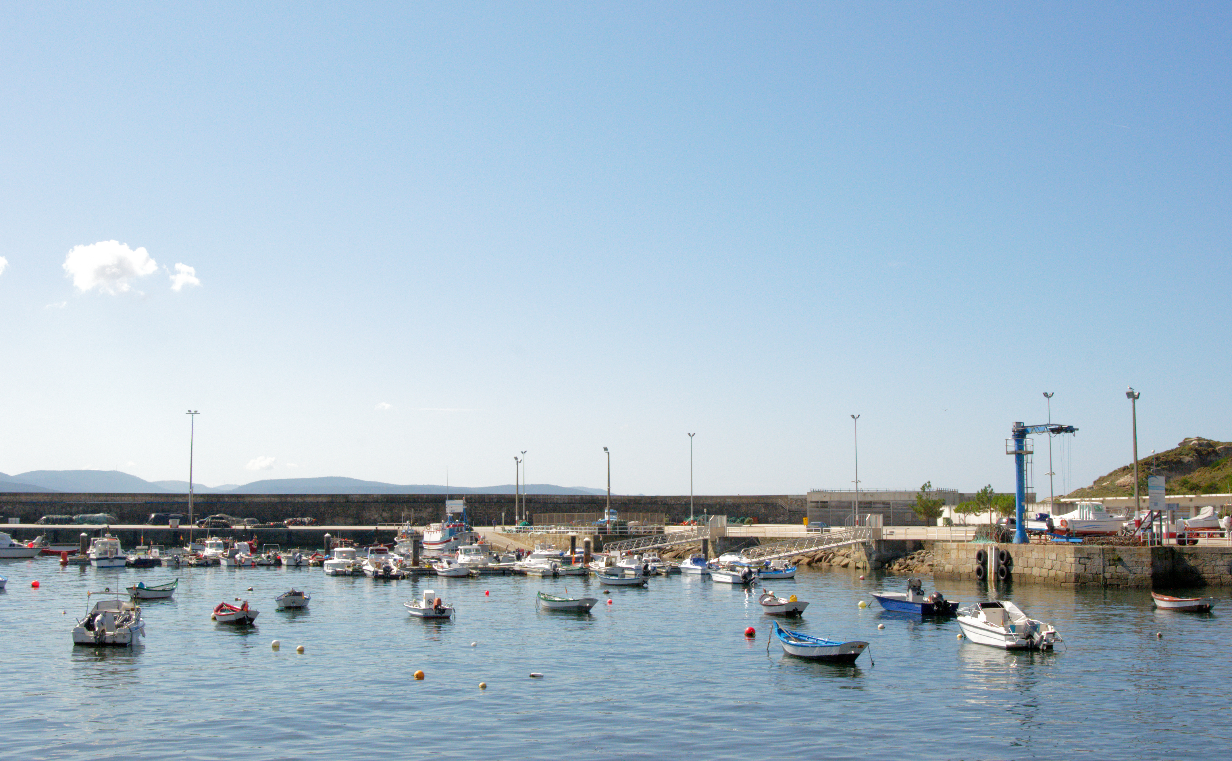 Puerto de Corme en Galicia